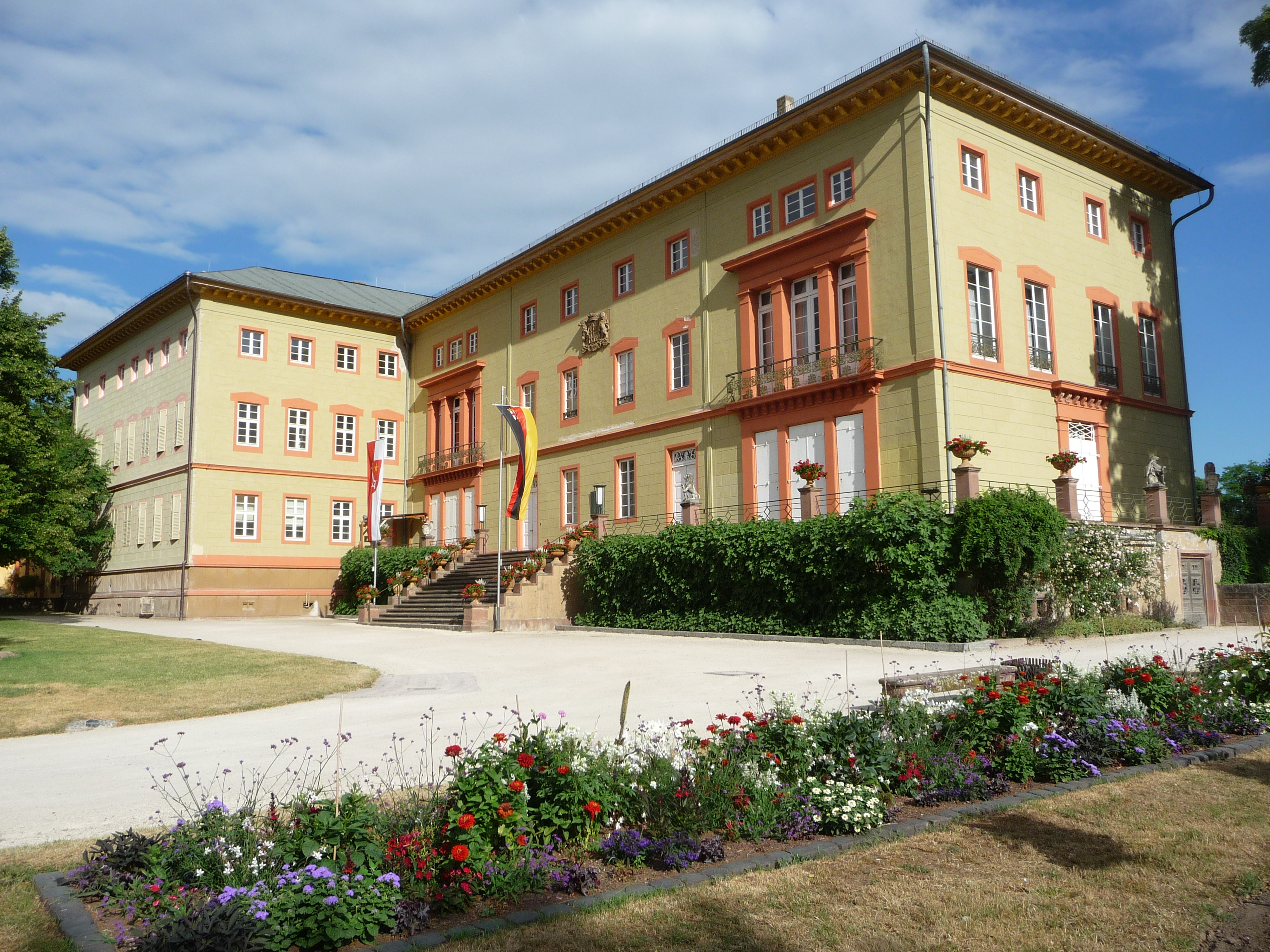 Herrnsheimer Schloss aus dem 19. Jahrhundert im Wormser Stadtteil Herrnsheim in Rheinland-Pfalz